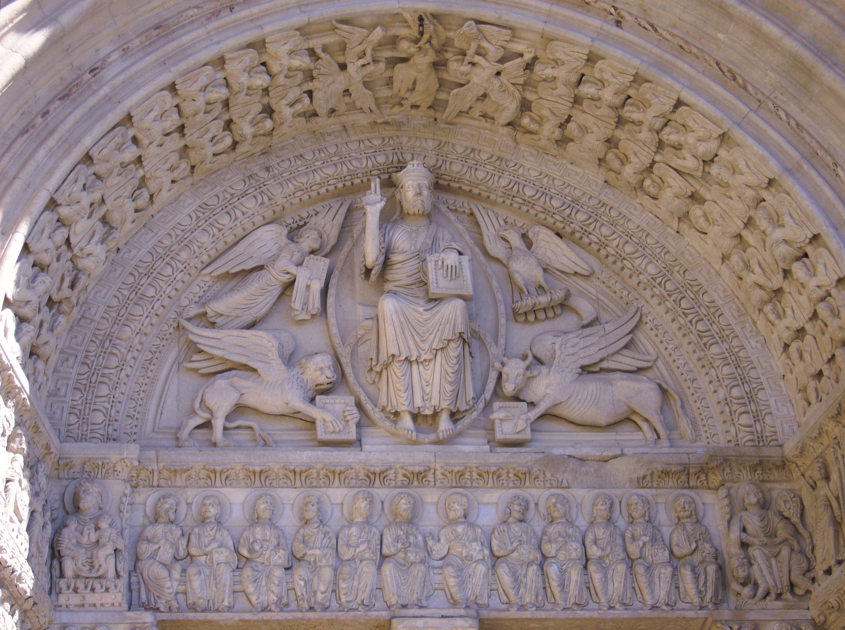 Partie supérieure du portail de l’église Saint Trophime à Arles.